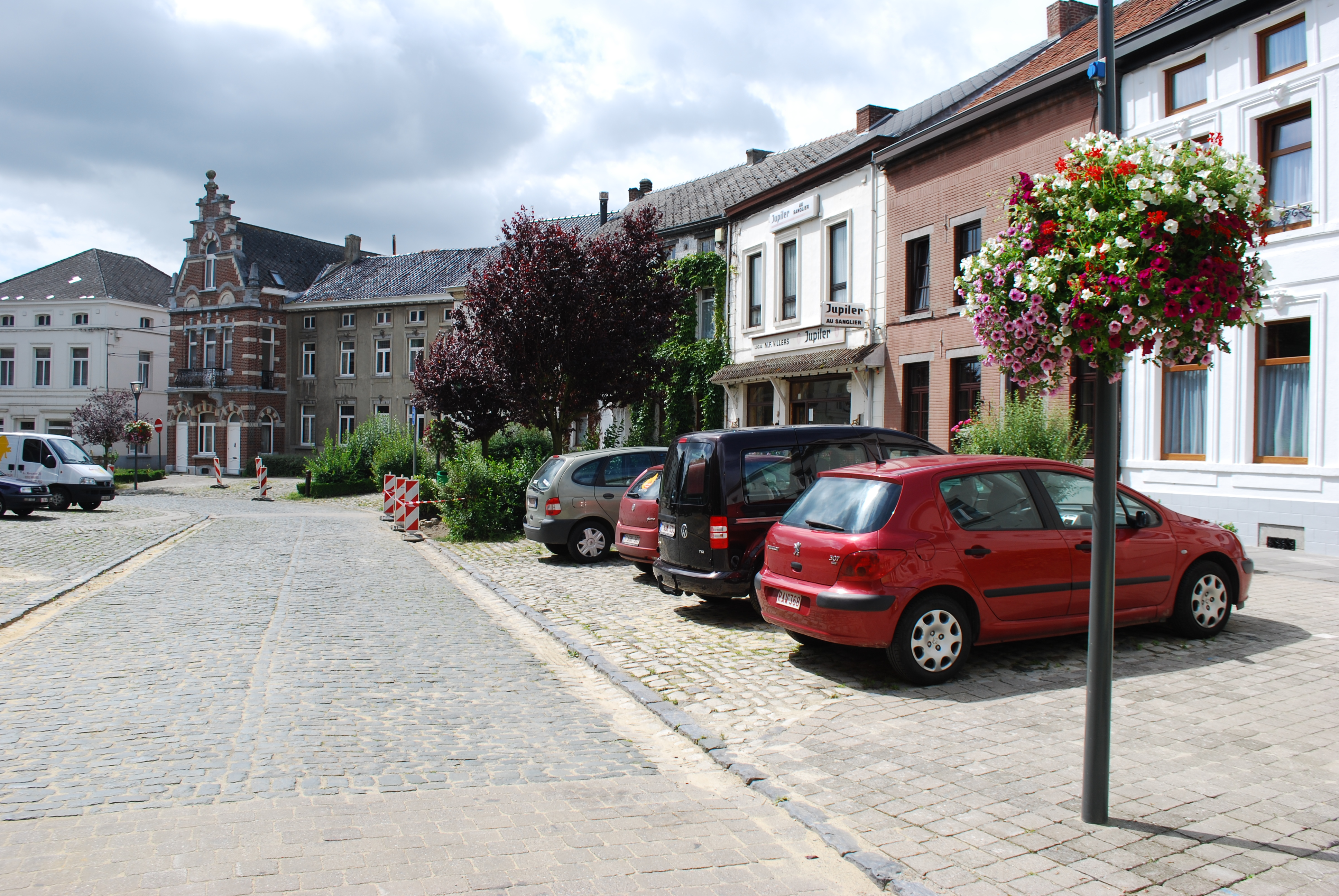 Vue de Marbais (Villers-la-Ville).